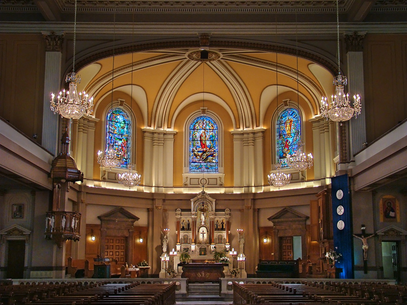 Église Très-Saint-Rédempteur, Montréal, Québec, Canada.